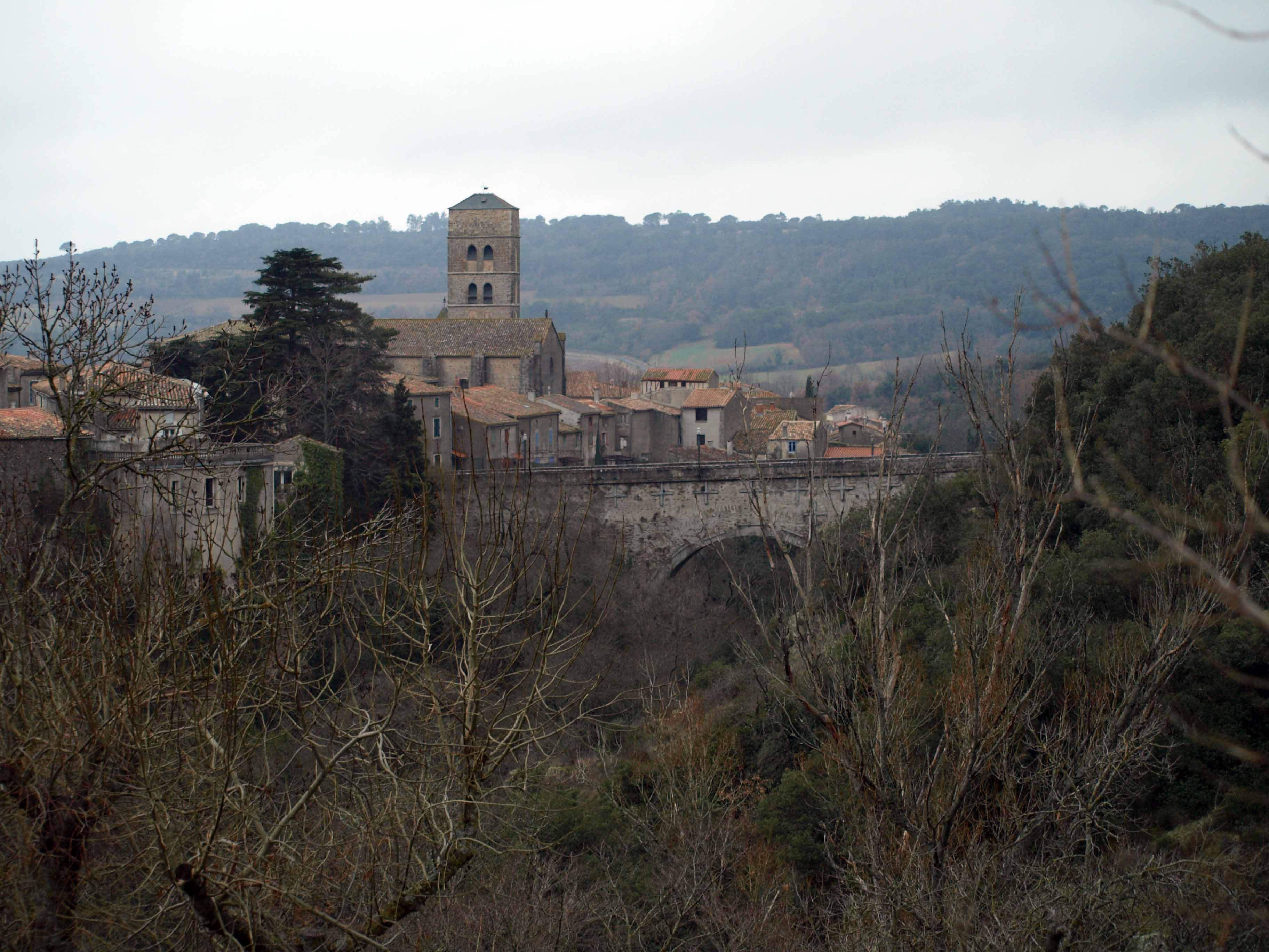 Village de Montolieu - département de l'Aude (France)